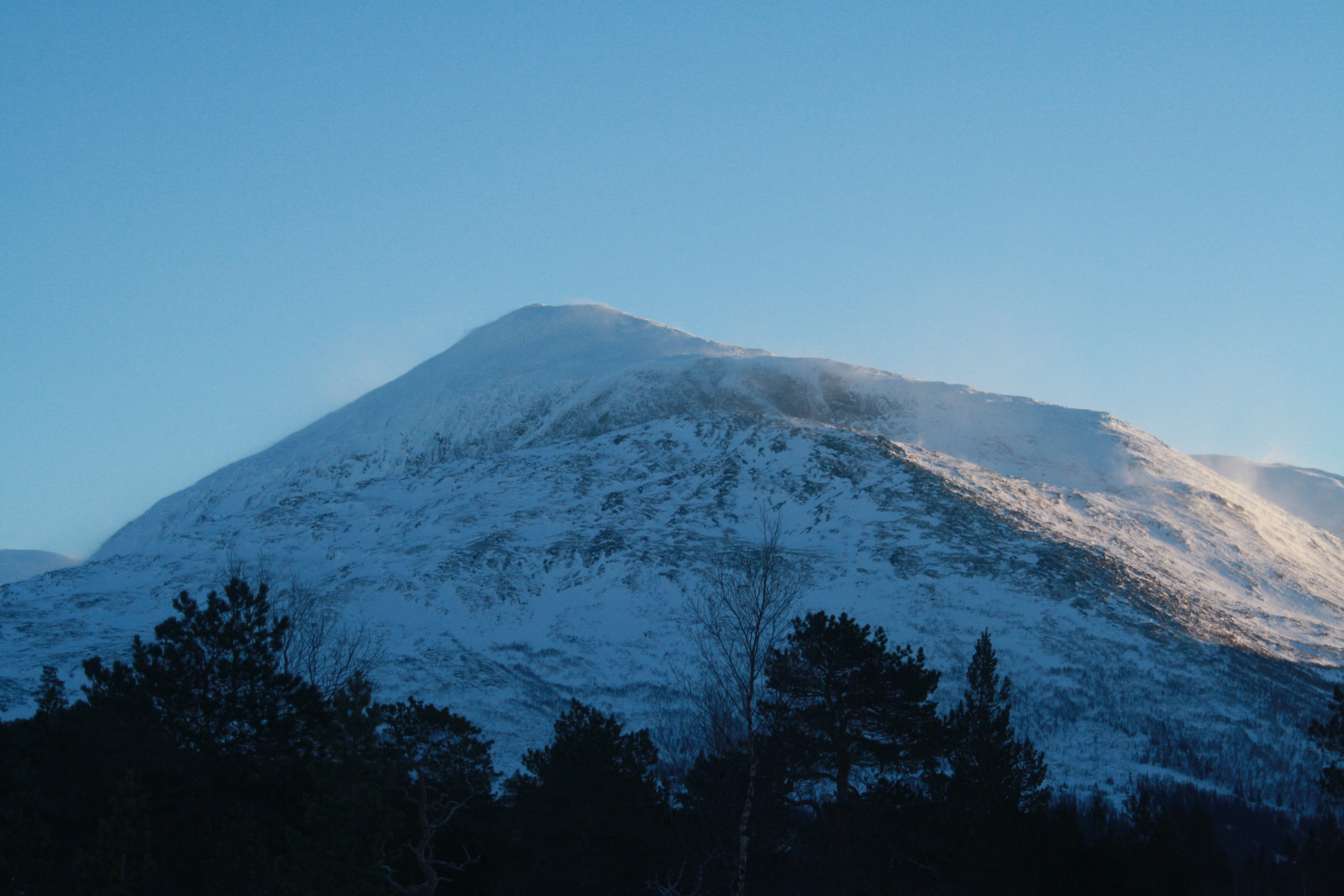 Vind i Brurskanken i Vefsn kommune, Nordland fylke. Bilde tatt den 19 januar 2015.